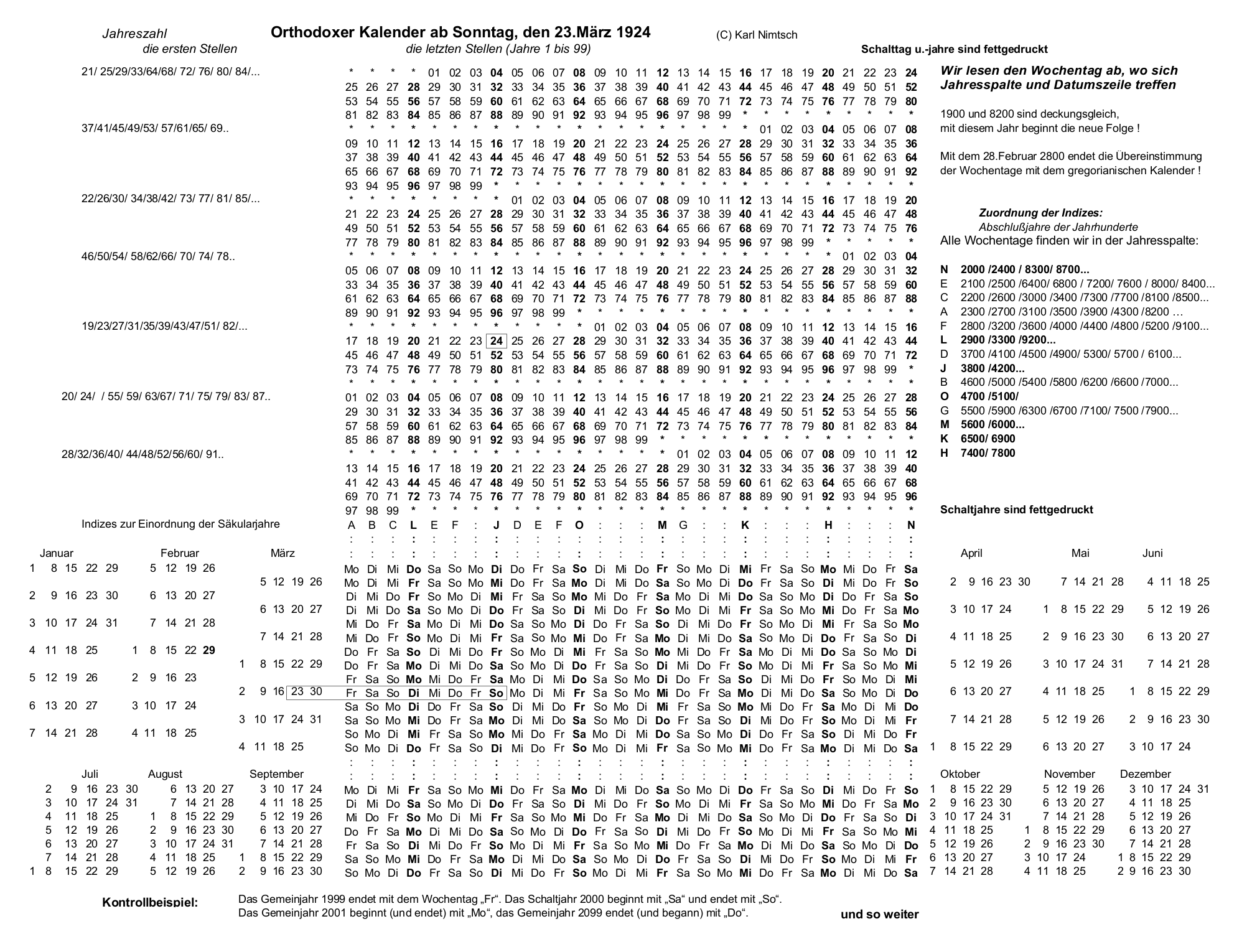 Diese Tabelle ermöglicht das Ablesen des Wochentages zu jedem beliebigen Datum im Orthodoxen Kalender ab 23.März 1924